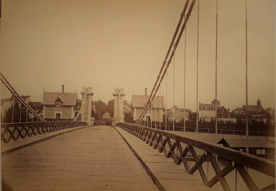 Pont suspendu de Vichy en 1865. La date peut-être vérifiée car le pont a été détruit par la crue de 1866 et les deux maisons d'entrée du pont ont été construite entre 1862 et 1864.